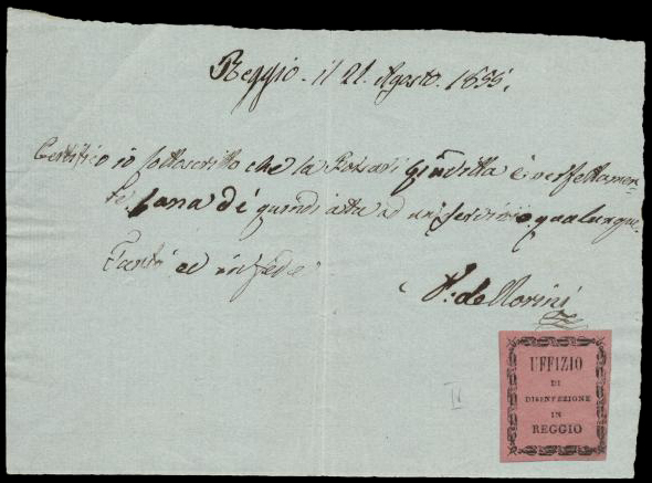 "Холерное письмо" с наклейкой Дезинфекционной службы Реджио